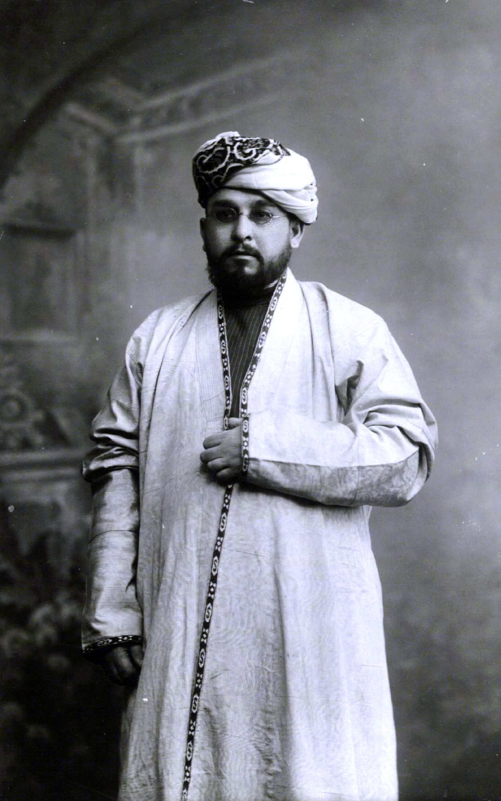 Усманов, Хайрулла Абдрахманович